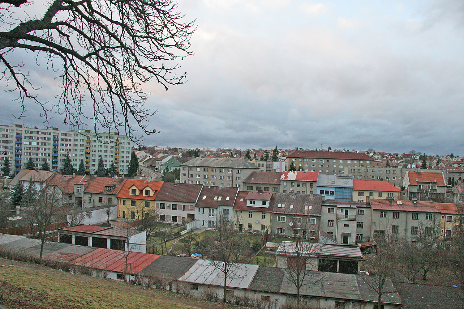 Pohled na Benešov z Karlova